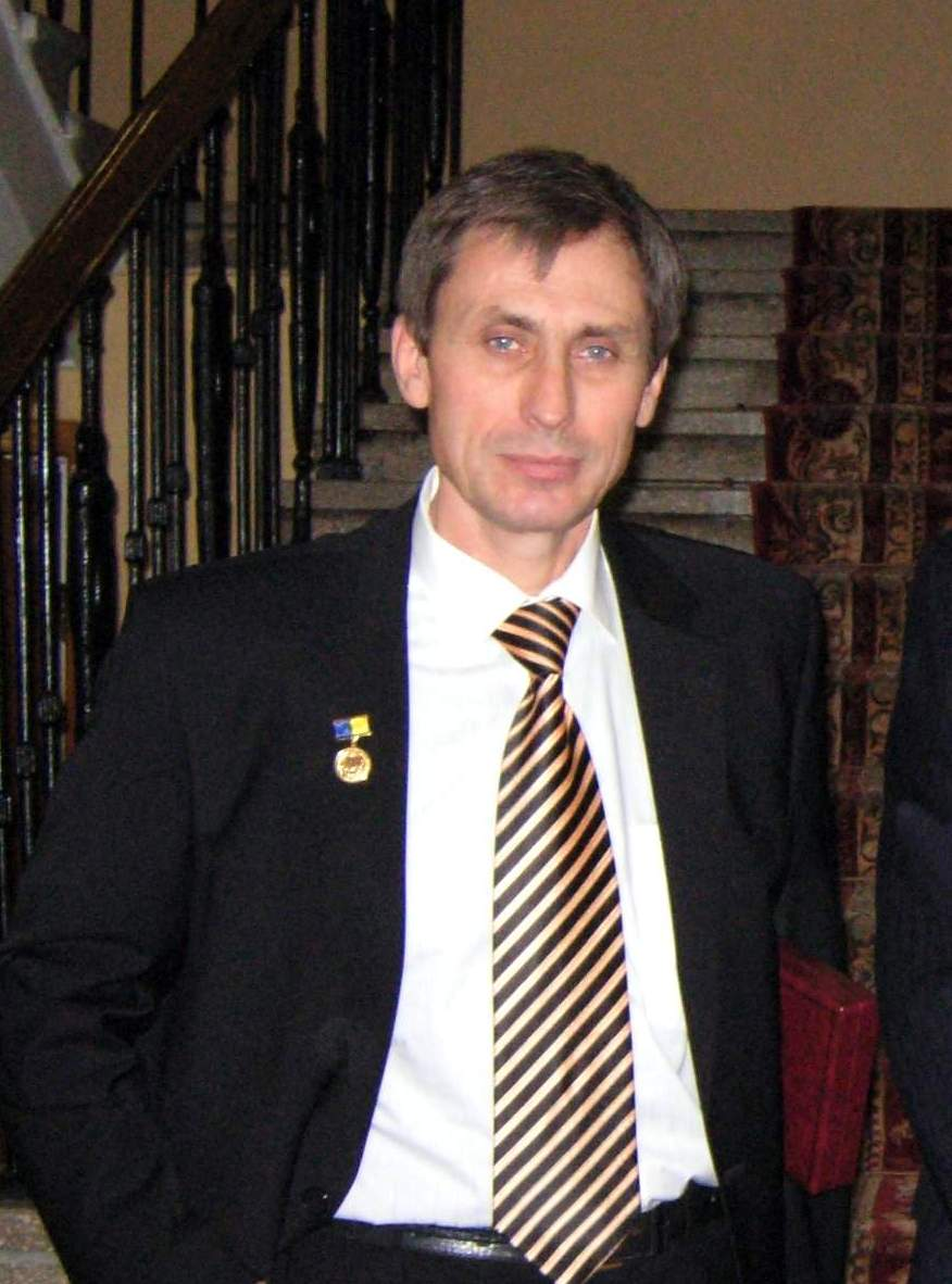 Карбівський Володимир Леонідович